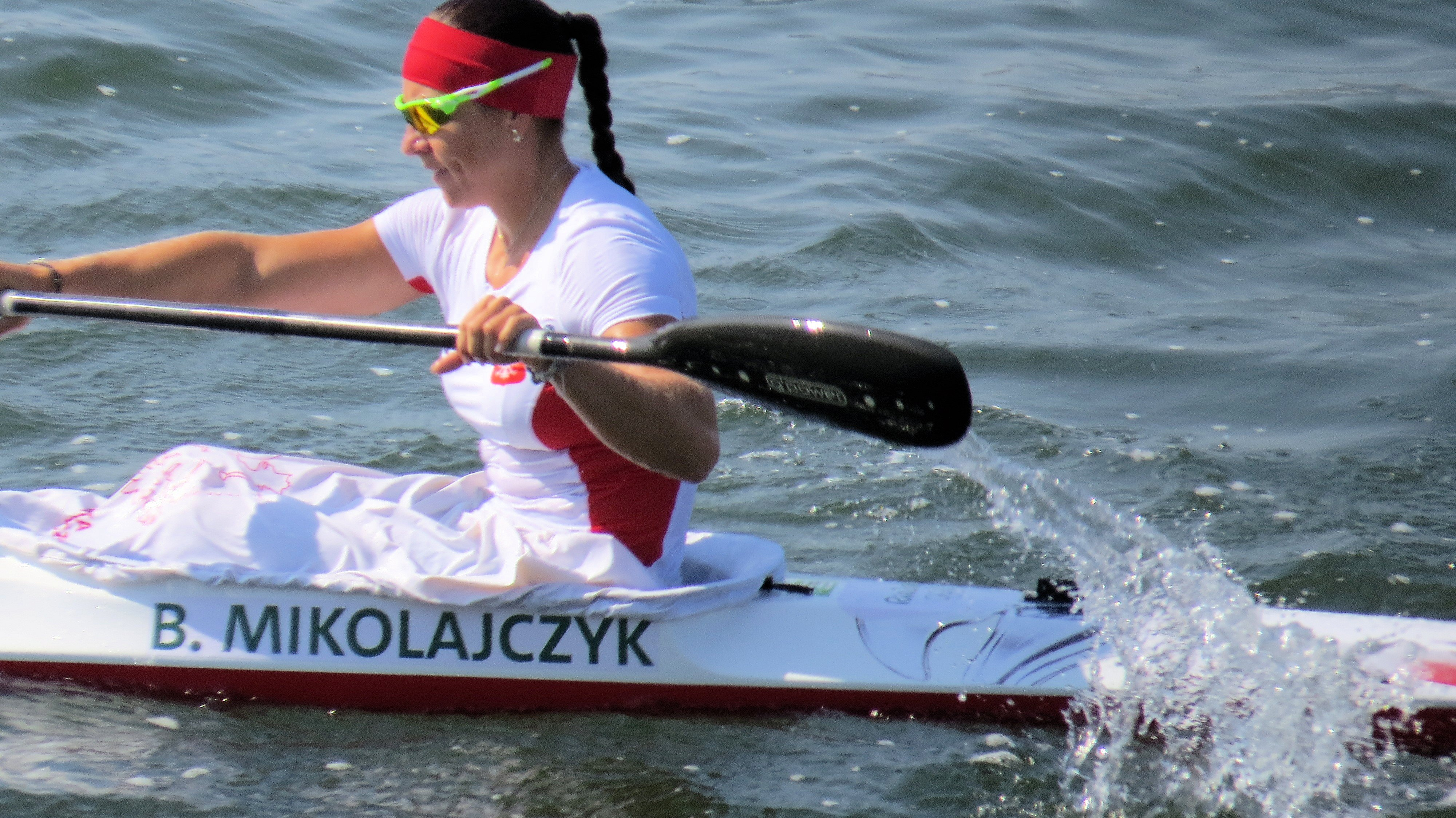 Sx50